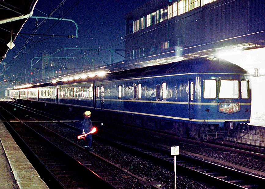 国鉄20系客車 特急 あかつき81号 下関駅にて